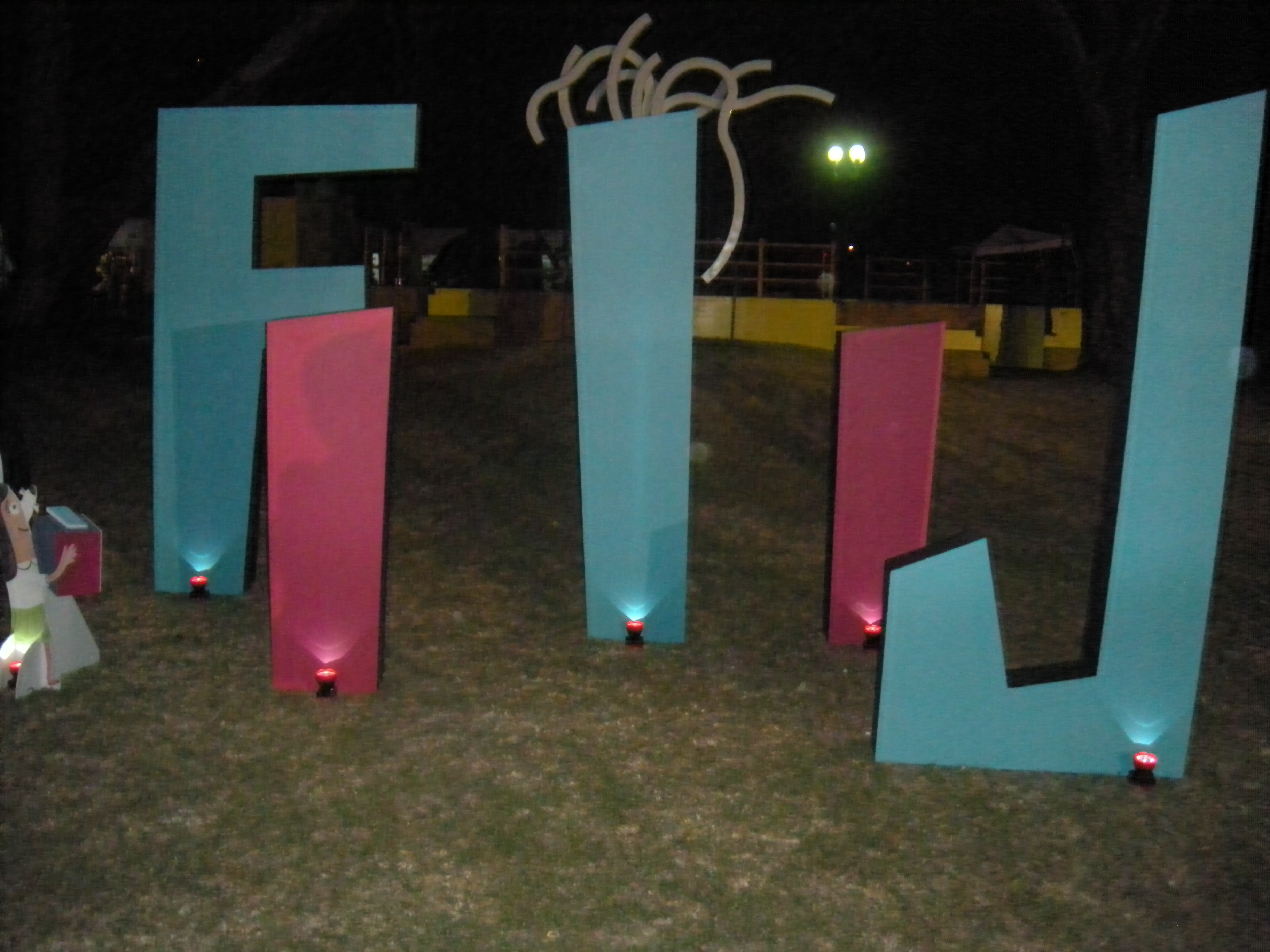 Feria Internacional del Libro Infantil y Juvenil (FILIJ) en la Ciudad de México edición 35